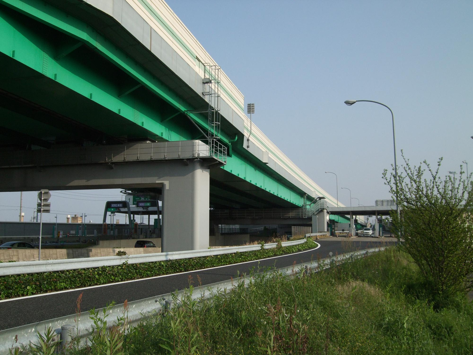 東海北陸自動車道 一宮西インターチェンジ 左に見えるのが料金所入口、右が出口 2008.4.27 投稿者が撮影